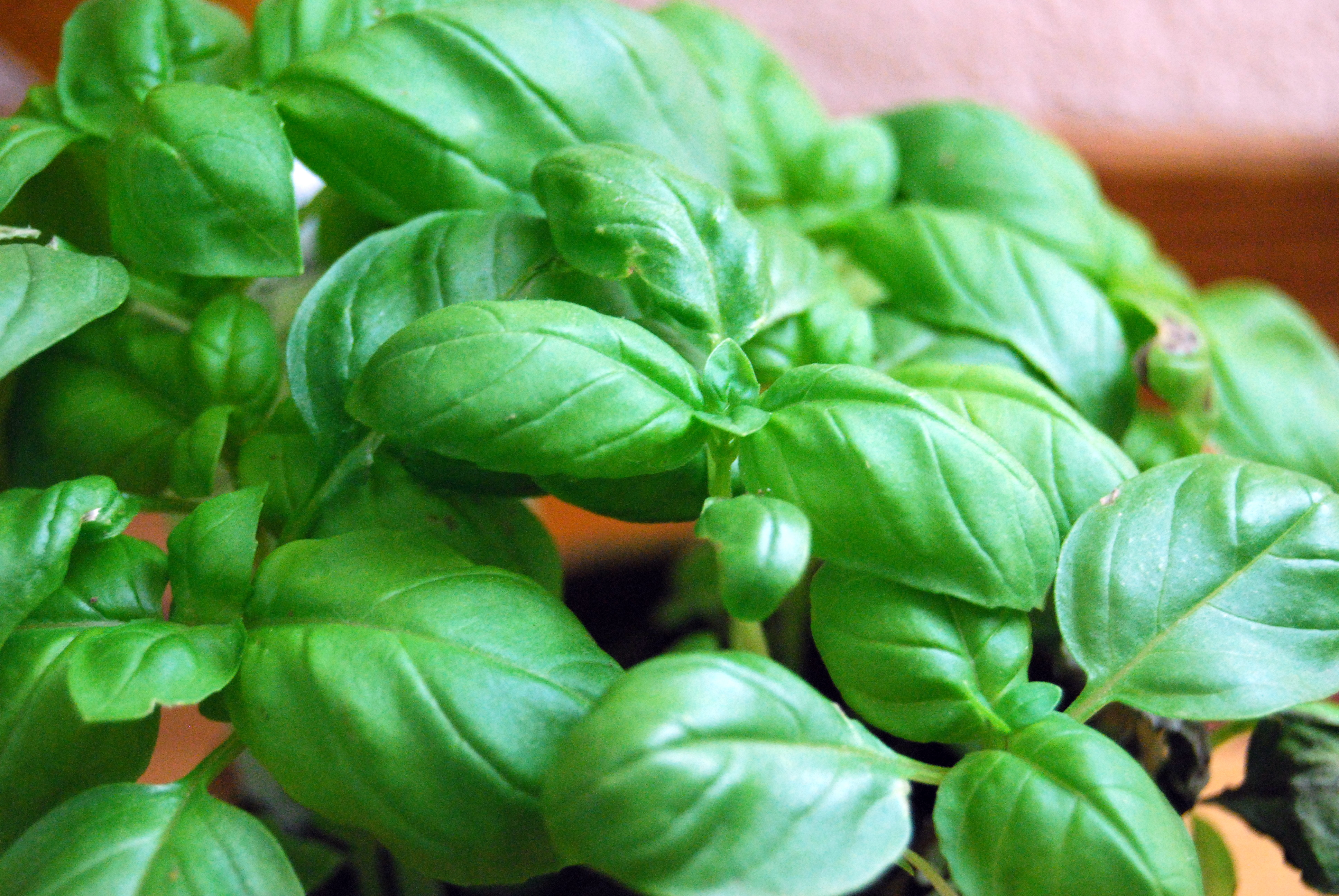 Basil plant leaves.